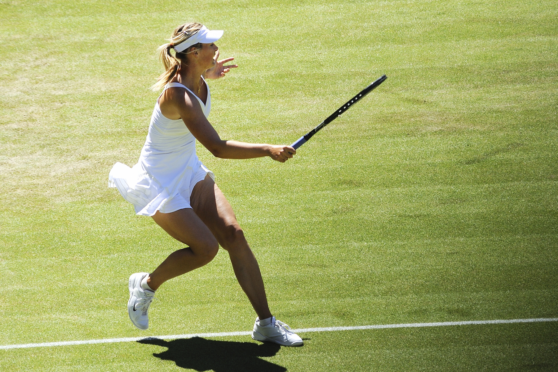 Maria Sharapova – Wimbledon 2009